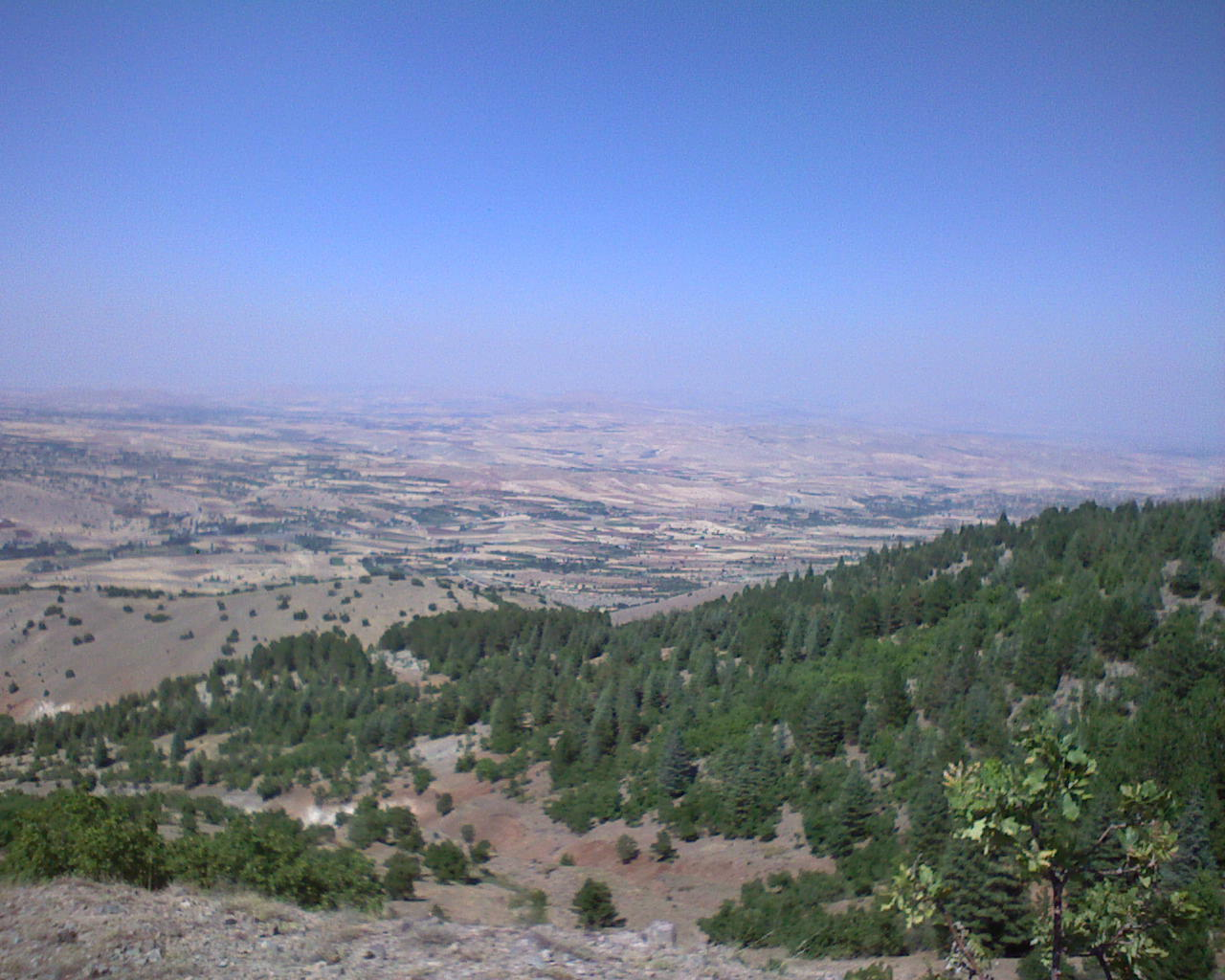 akpınar